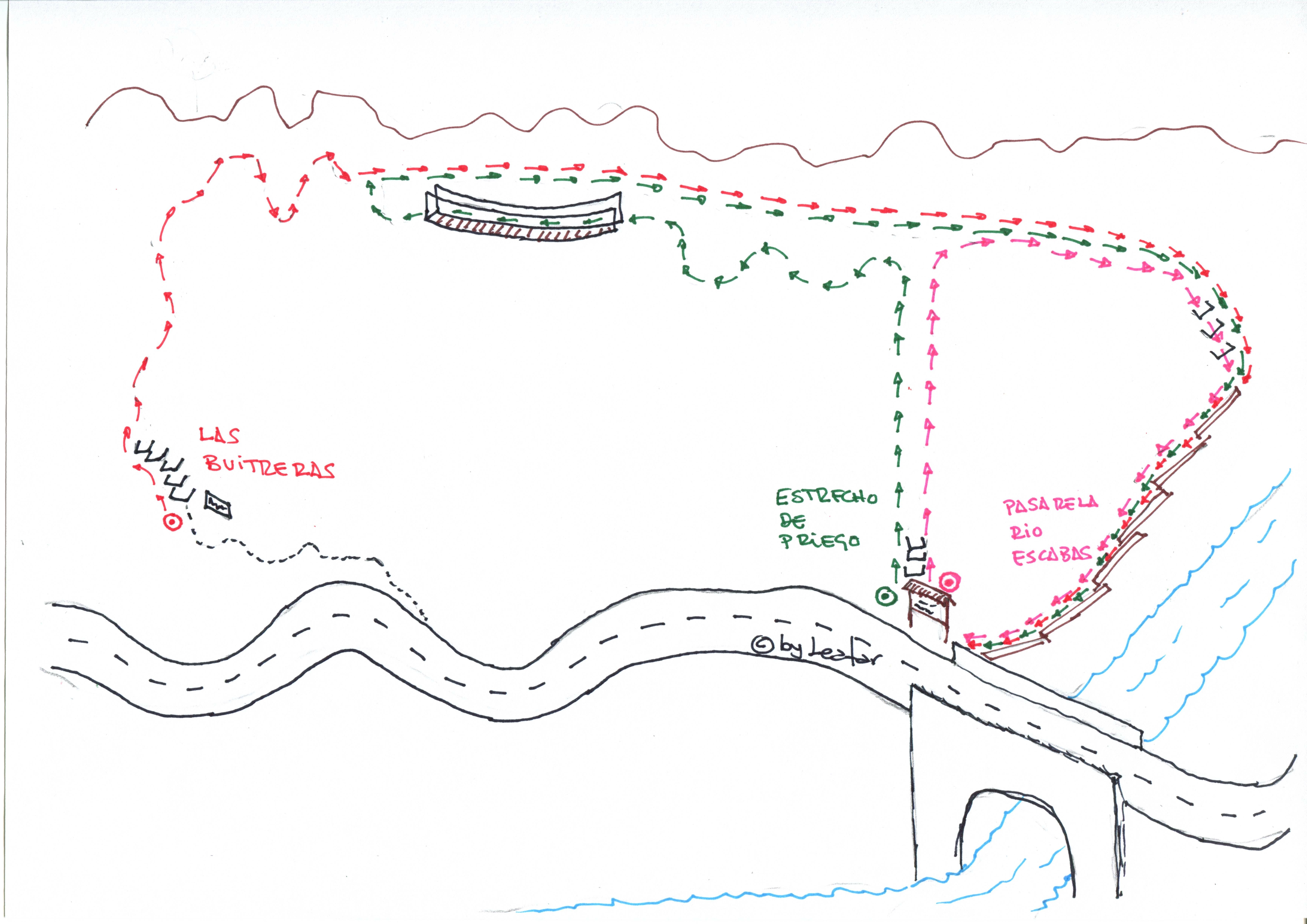 Croquis de las Ferratas de Priego